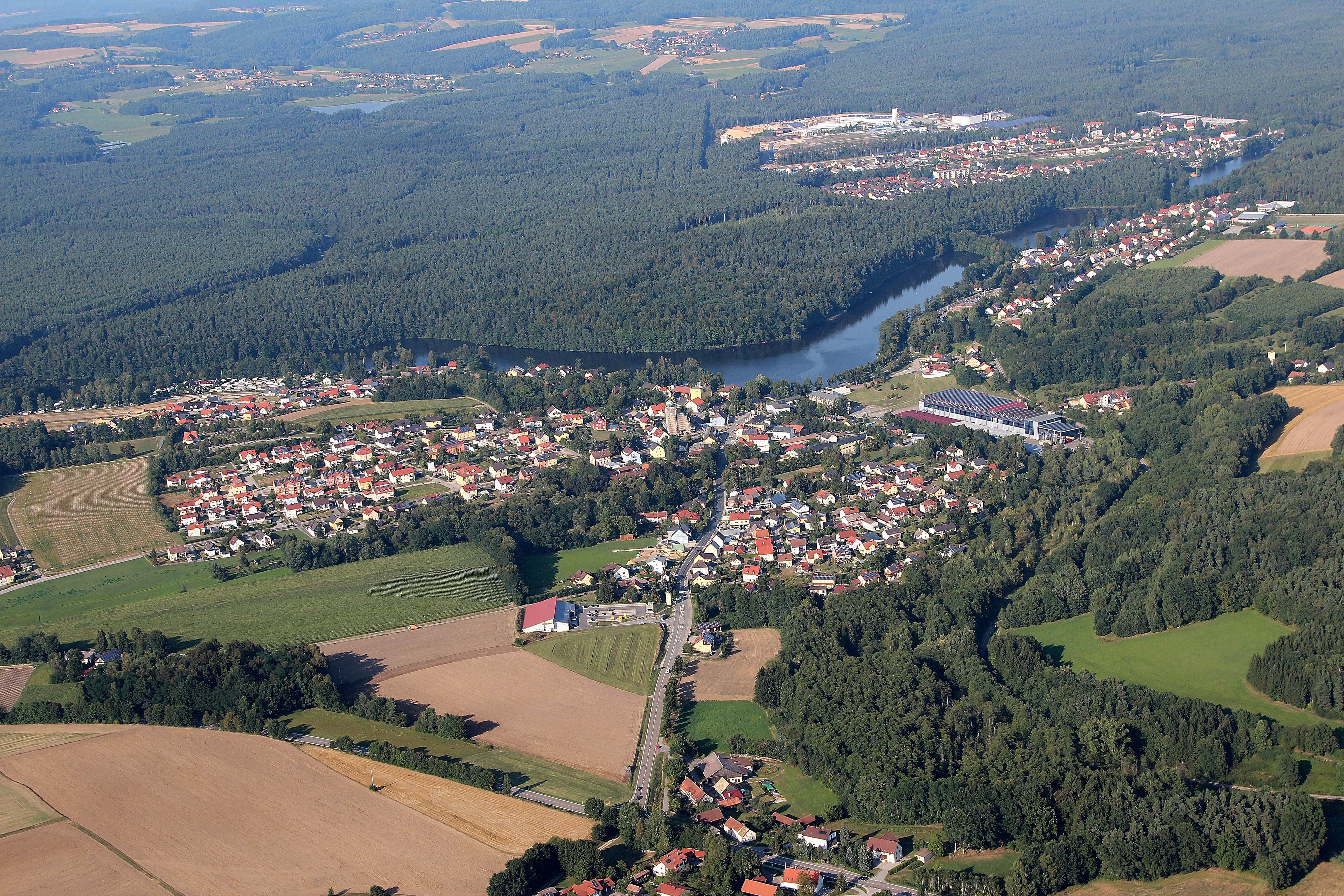 Bodenwöhr, Hammerweiher, Blechhammer (oberer Bildrand, rechts), Landkreis Schwandorf, Oberpfalz, Bayern